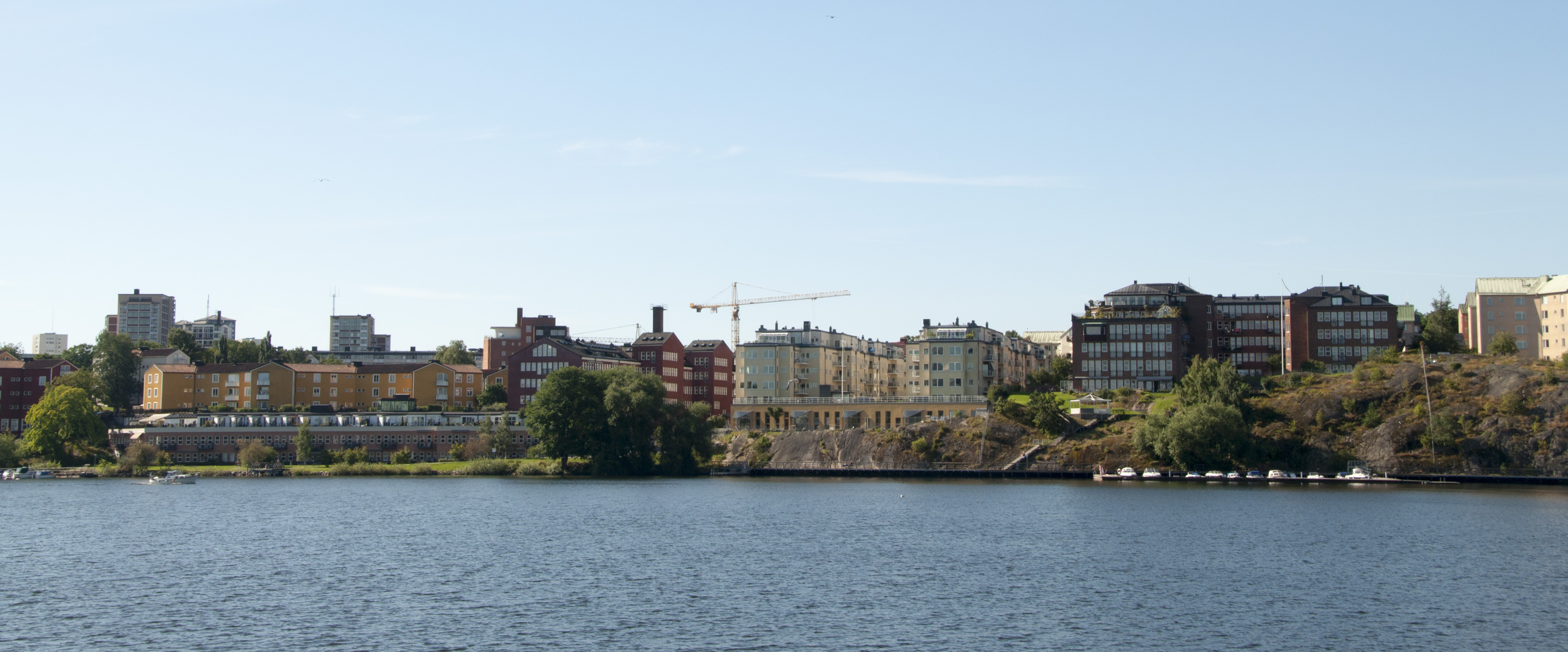 Gröndal m. kv. Akterspegeln (t.v.). Leif Reinius (Arkitekt) Olle Engkvist Byggnads AB (Byggmästare) Olle Engkvist Byggnads AB (Byggherre) Sven Backström (Arkitekt)